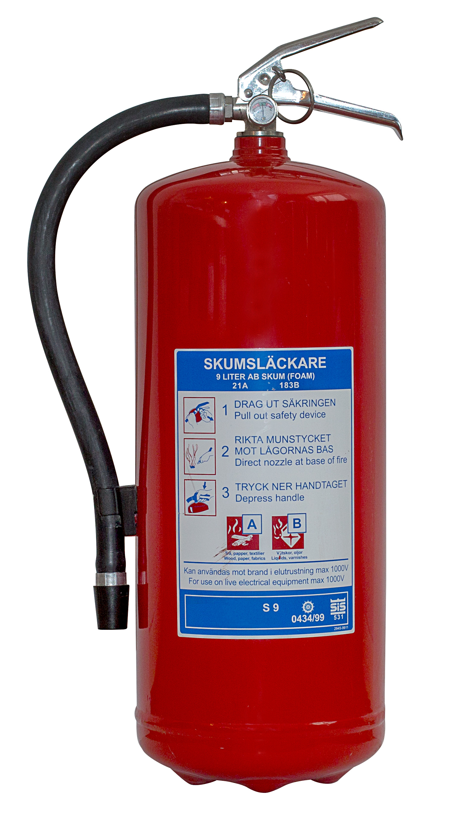 Brandsläckare. skum 9 liter.